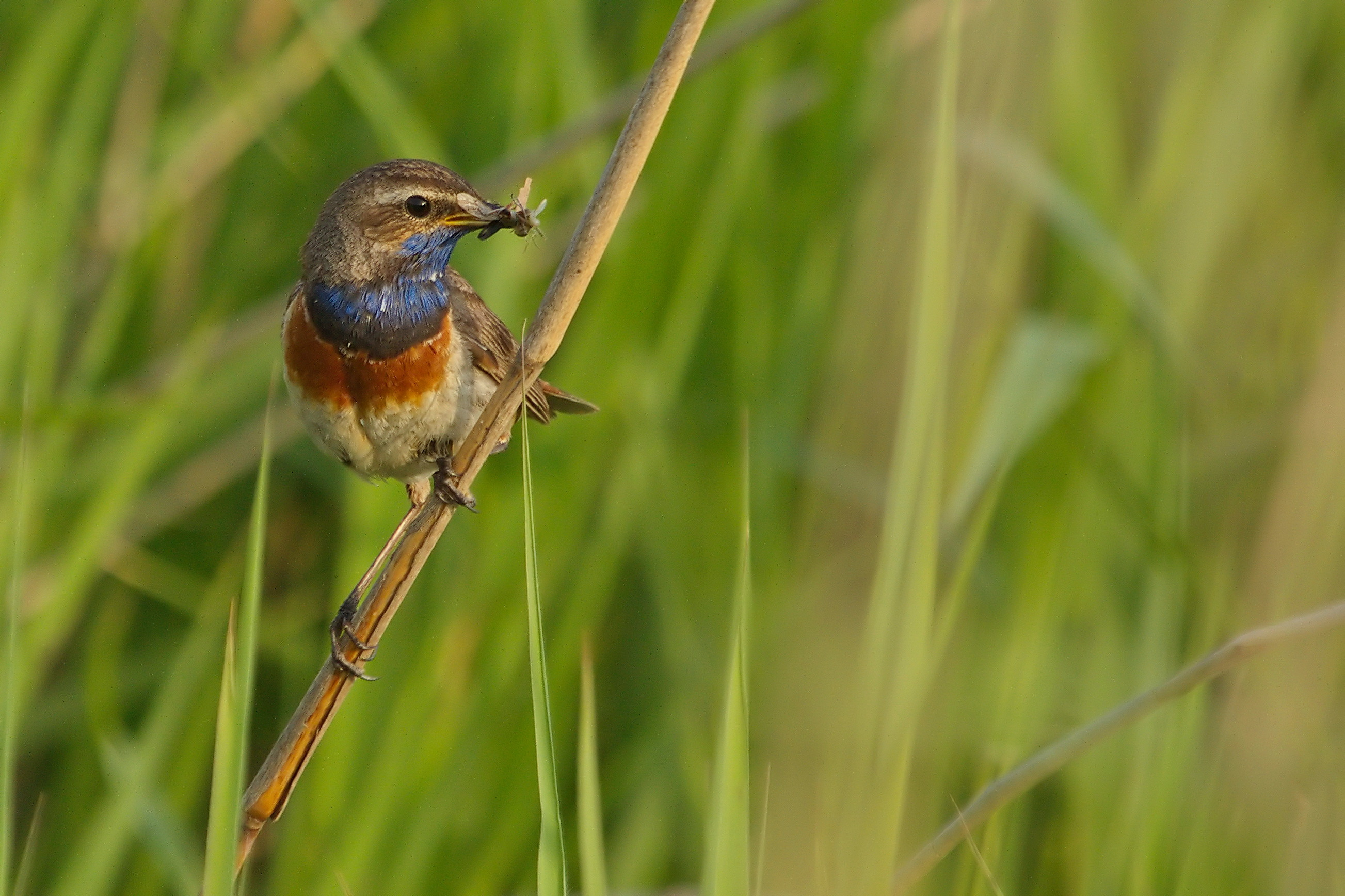 Afgelopen voorjaar deze opname kunnen maken. Hopelijk zijn ze er komend voorjaar weer om te nestellen op deze mooie locatie. Op nog geen 10 meter afstand van elkaar waren 2 mannetjes af en aan aan het vliegen om hun jongen te voeren.